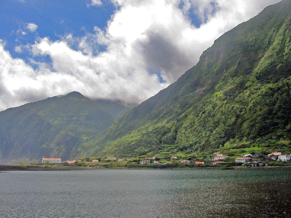 Lagoa da Caldeira de Santo Cristo, Calheta, ilha de São Jorge, Açores, Portugal.